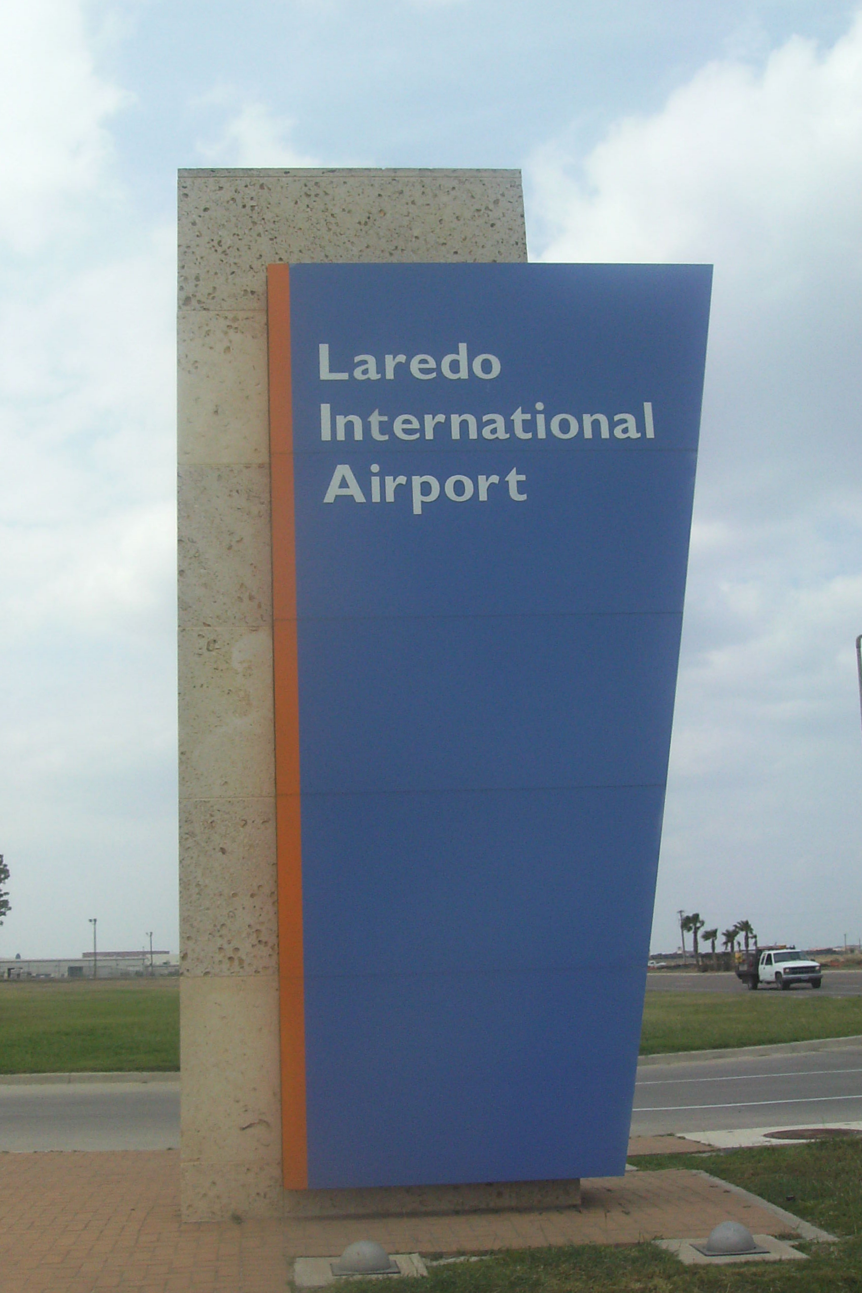 KLRD terminal entrance sign